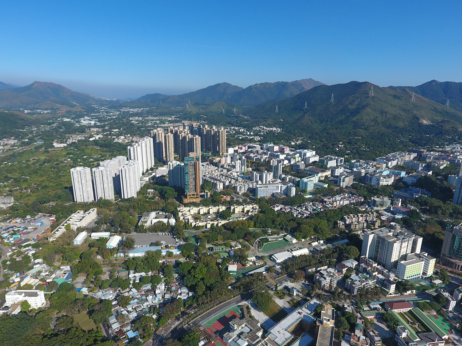 Fanling aerial view